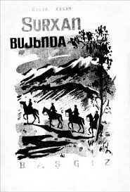 Обложка книги "На Сурхане" башкирского писателия Хасана Башара (1901-1938)